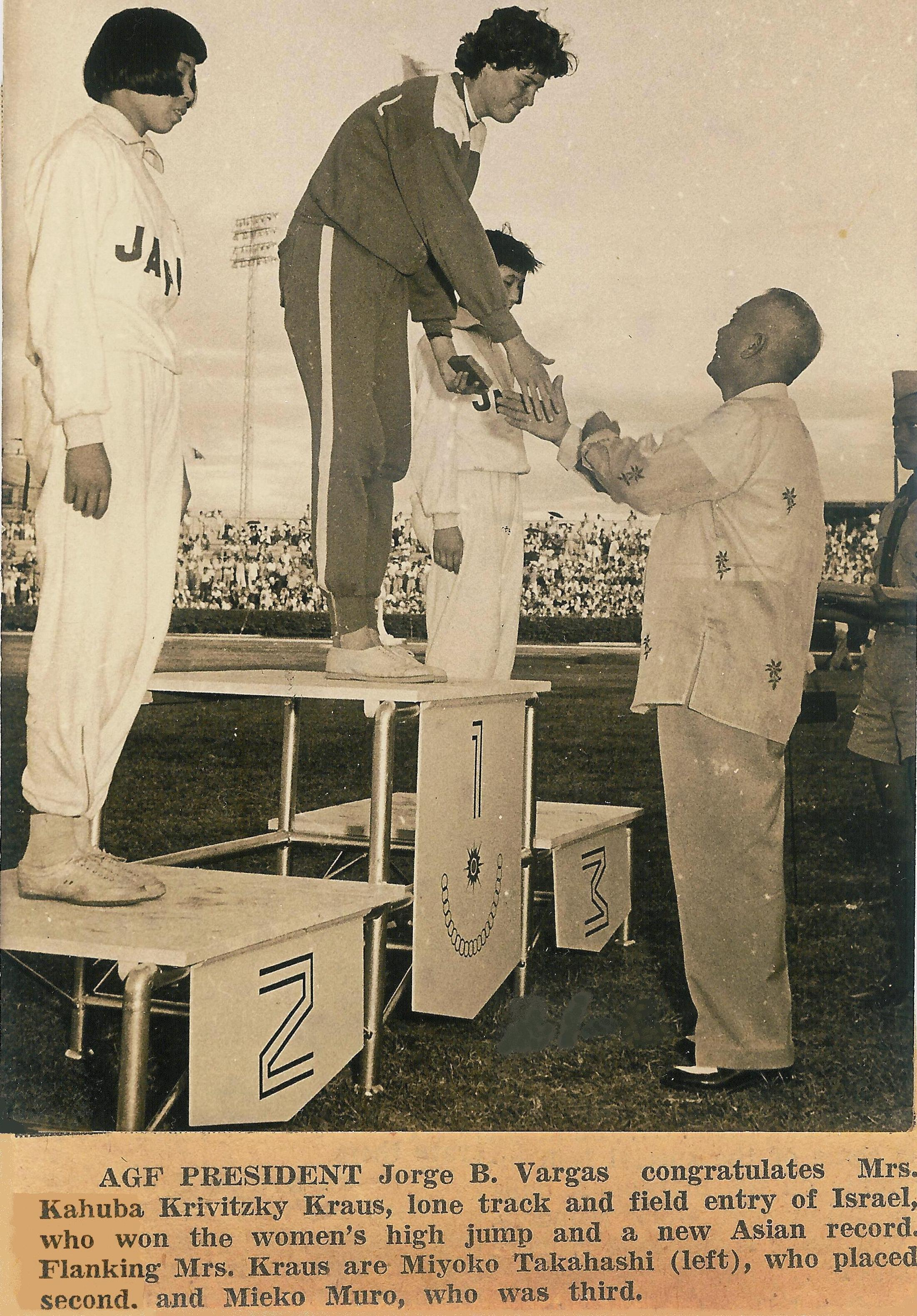 אהובה קריביצקי-קראוז זכתה במקום הראשון ובמדליית זהב במשחקי אסיה השניים במנילה 1954.